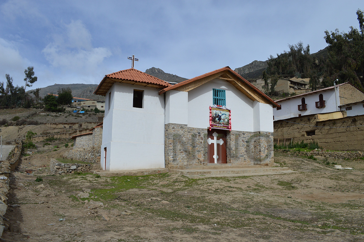 Church